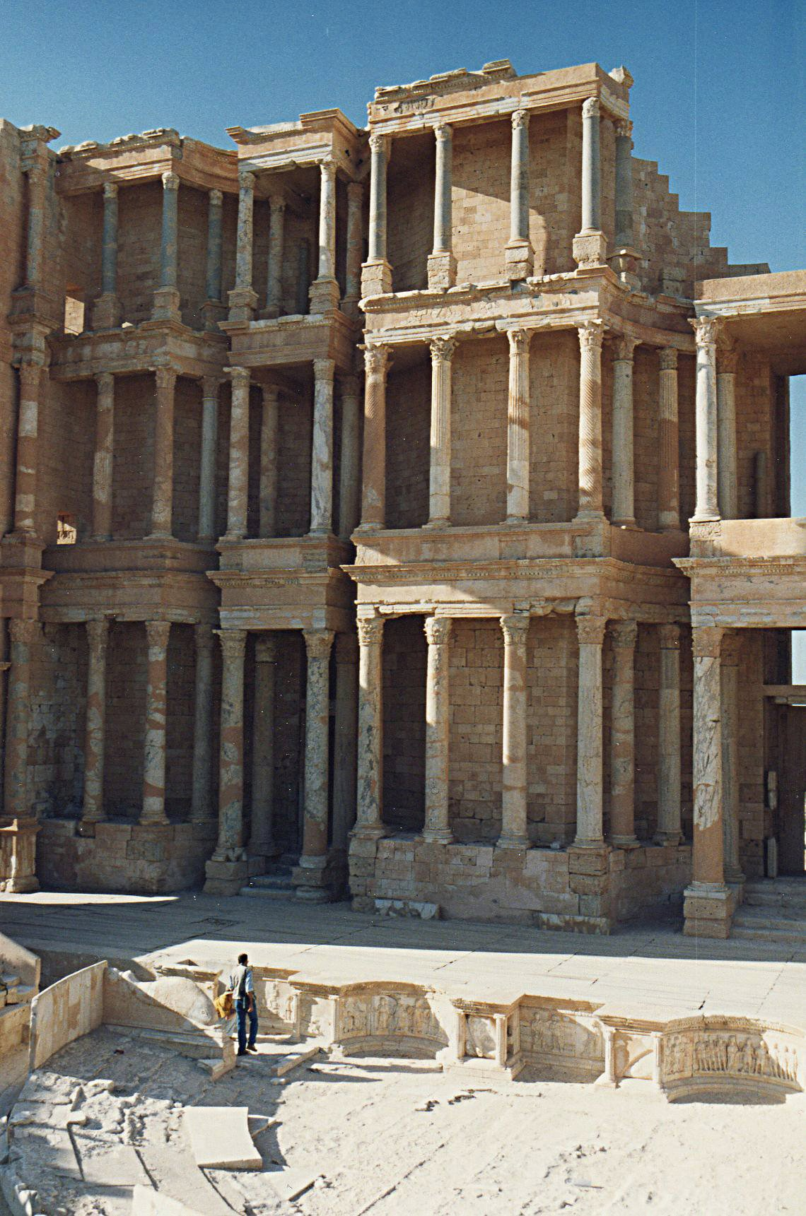 Théâtre de Sabratha (Libye), orchestre et mur de scène, partie gauche